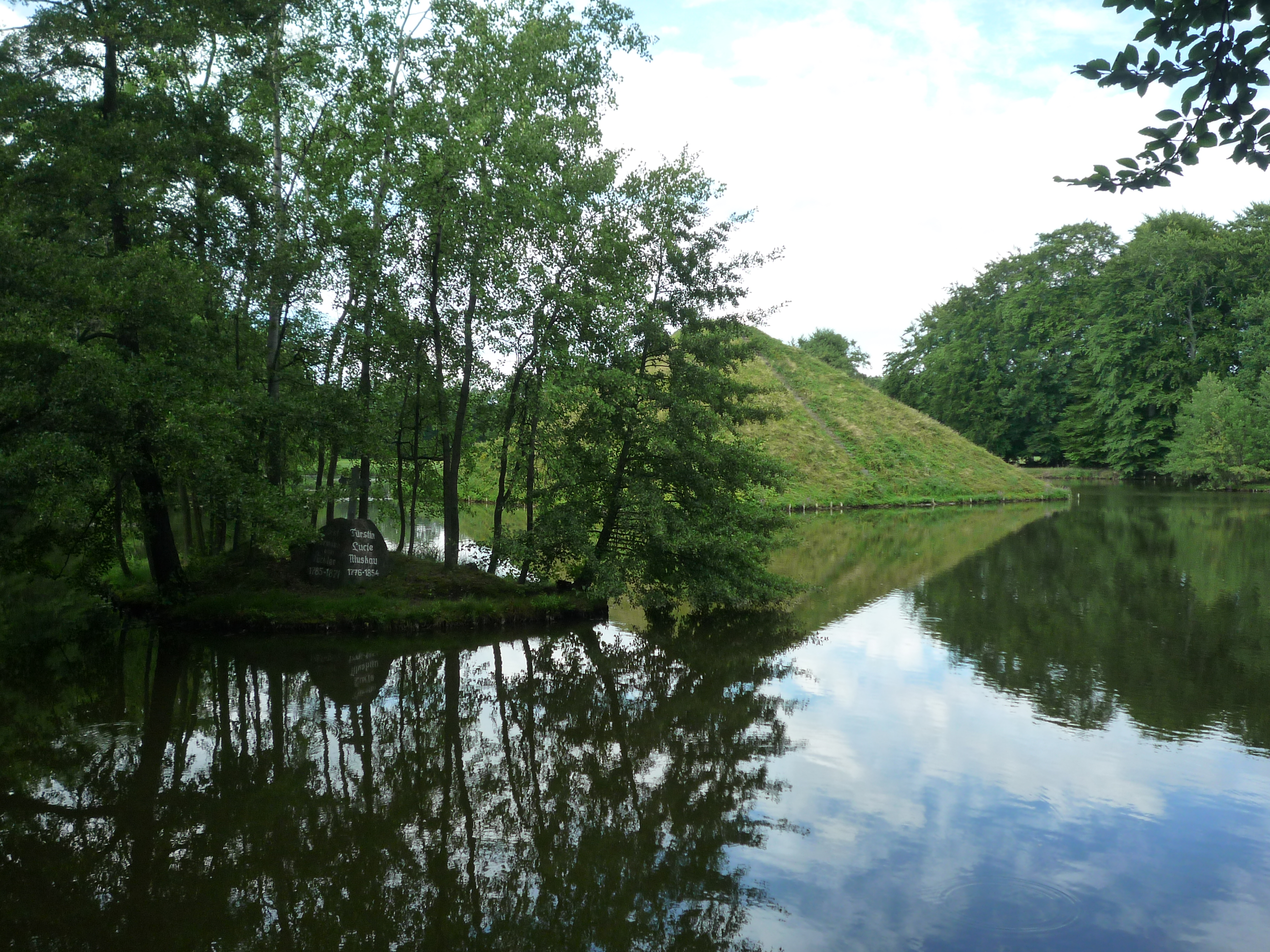 Auf der Insel befindet sich der Grabstein von Füst Hermann von Pückler Muskau und seiner Frau, Fürstin Lucie